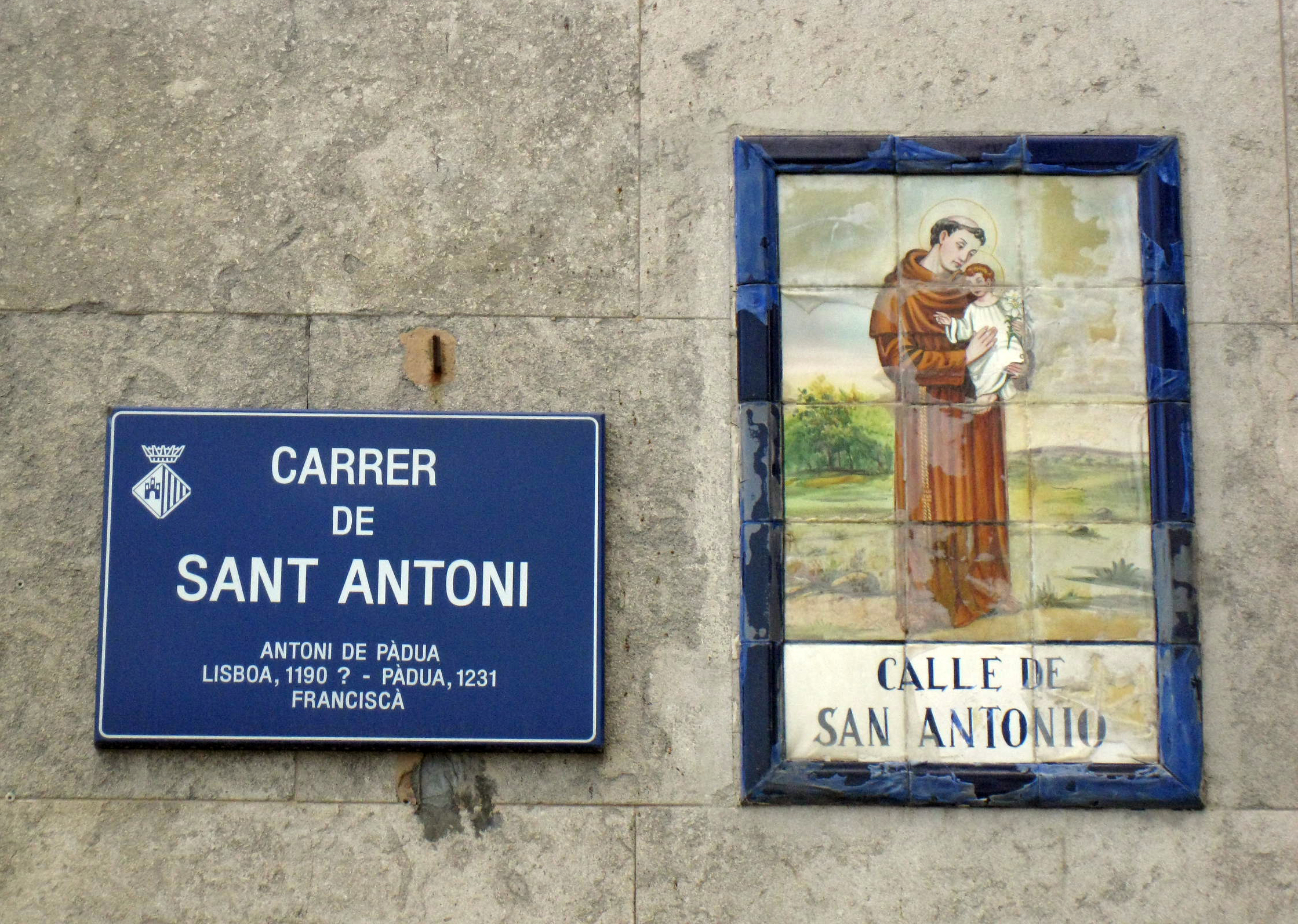 Plaques al carrer de Sant Antoni (Terrassa).